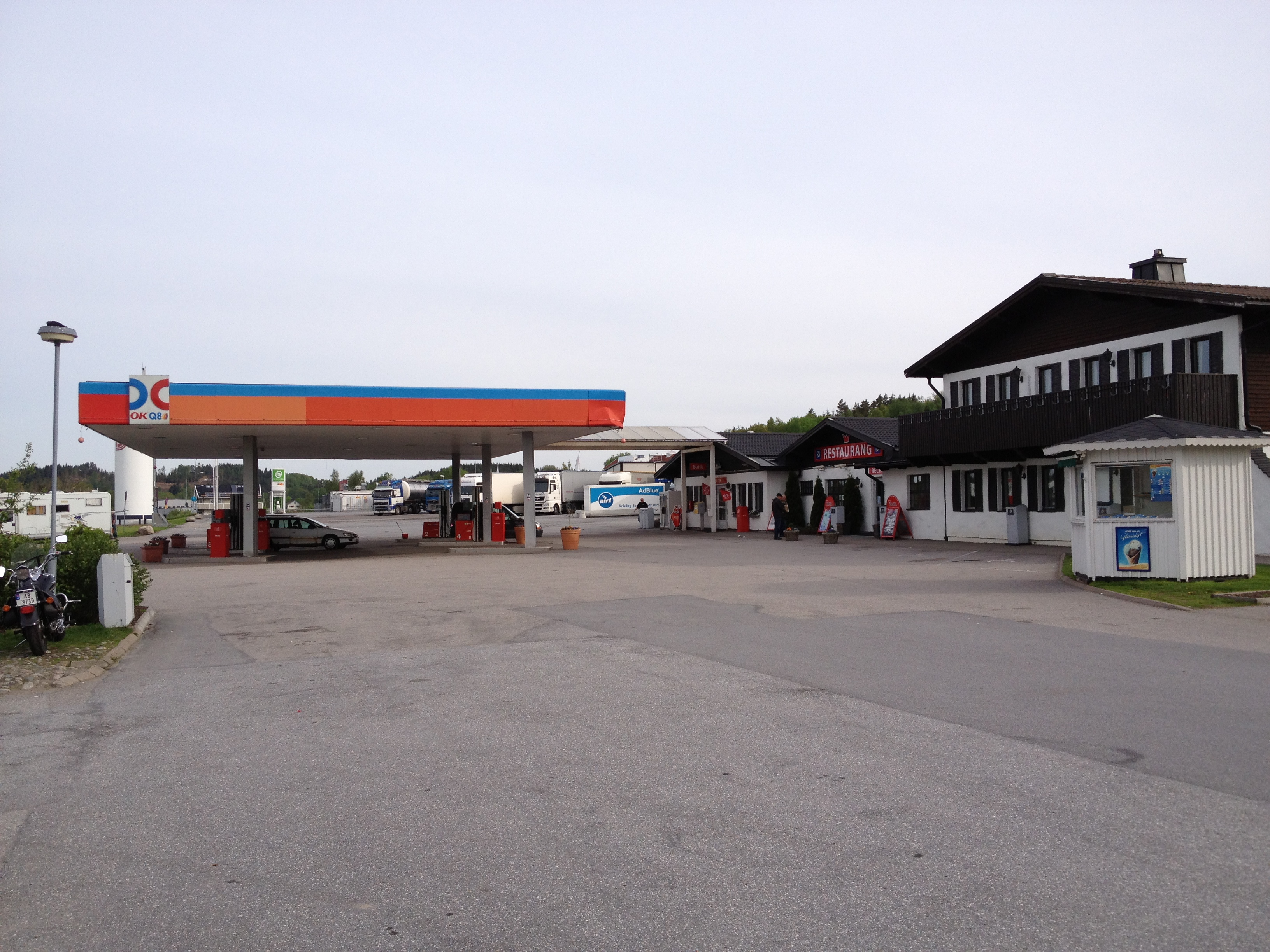 OKQ8 Håby Munkedals kommun